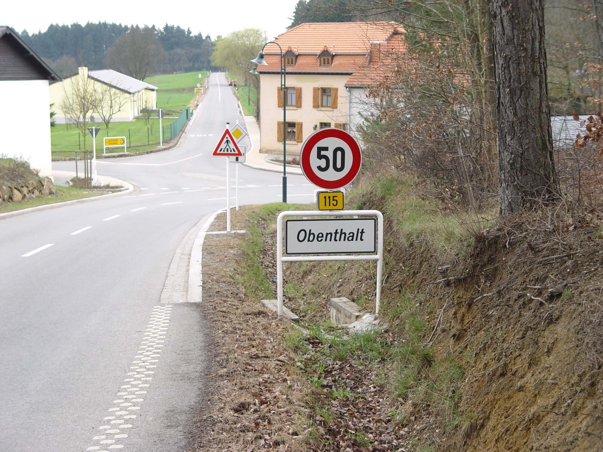 Sujet:Obenthalt. Openthalt Openthalt